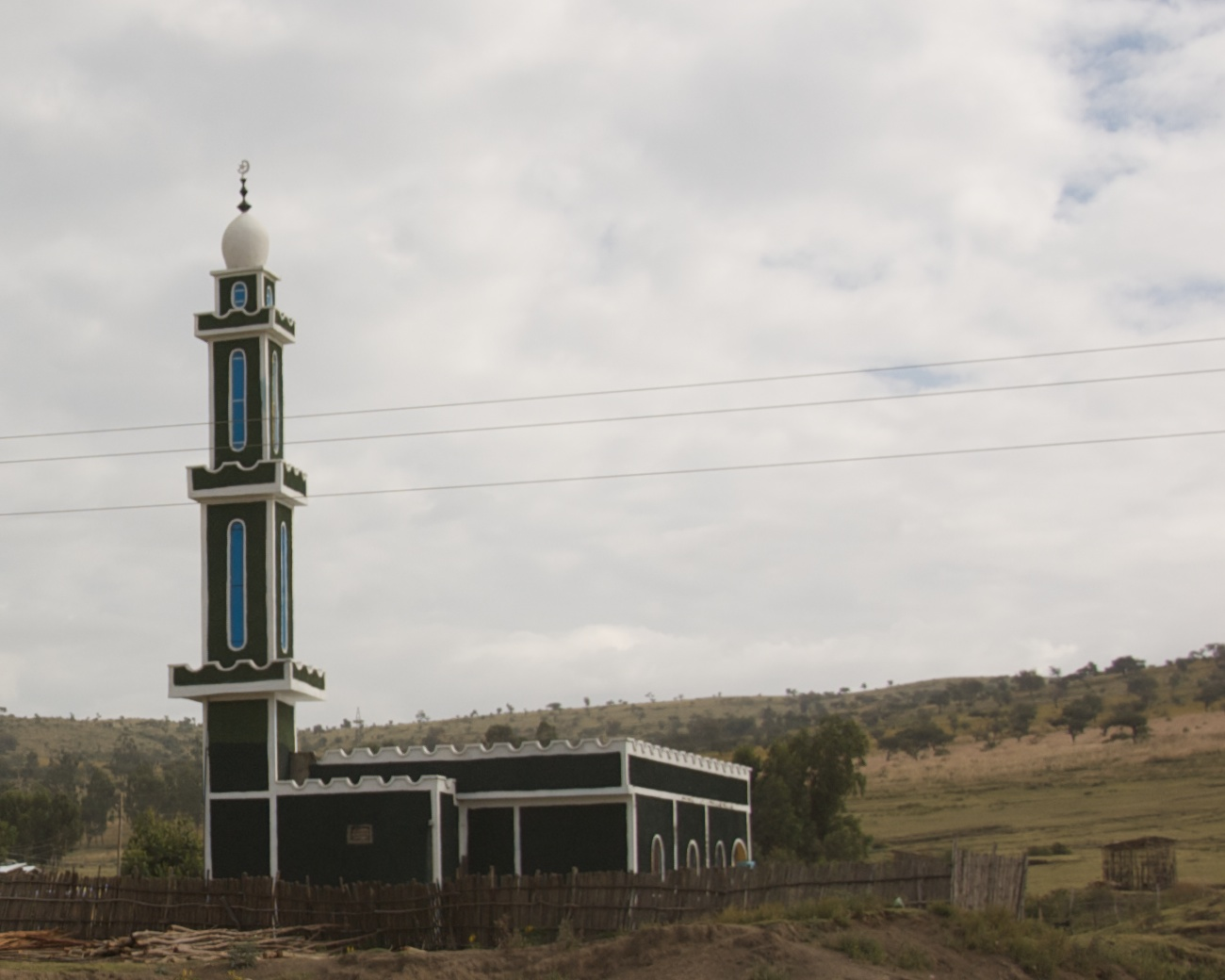 Ethiopia, 2007.